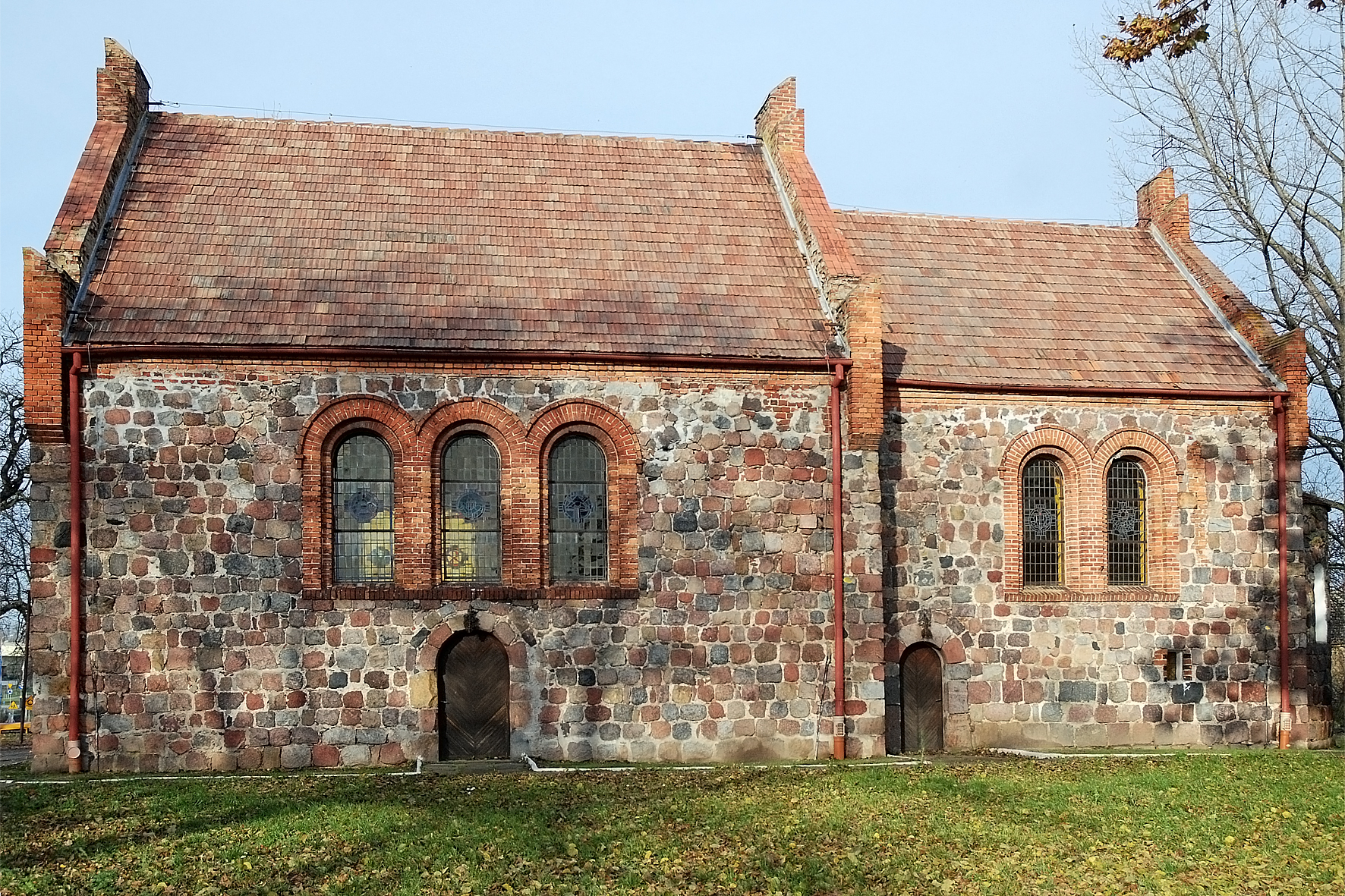 Gardno, kościół par. Najświętszego Serca Pana Jezusa (zabytek nr rejestr. 117)